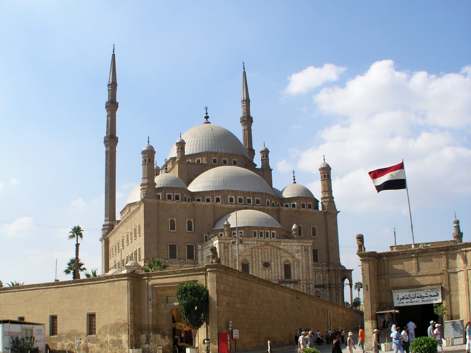 Alabastermoschee Außenansicht